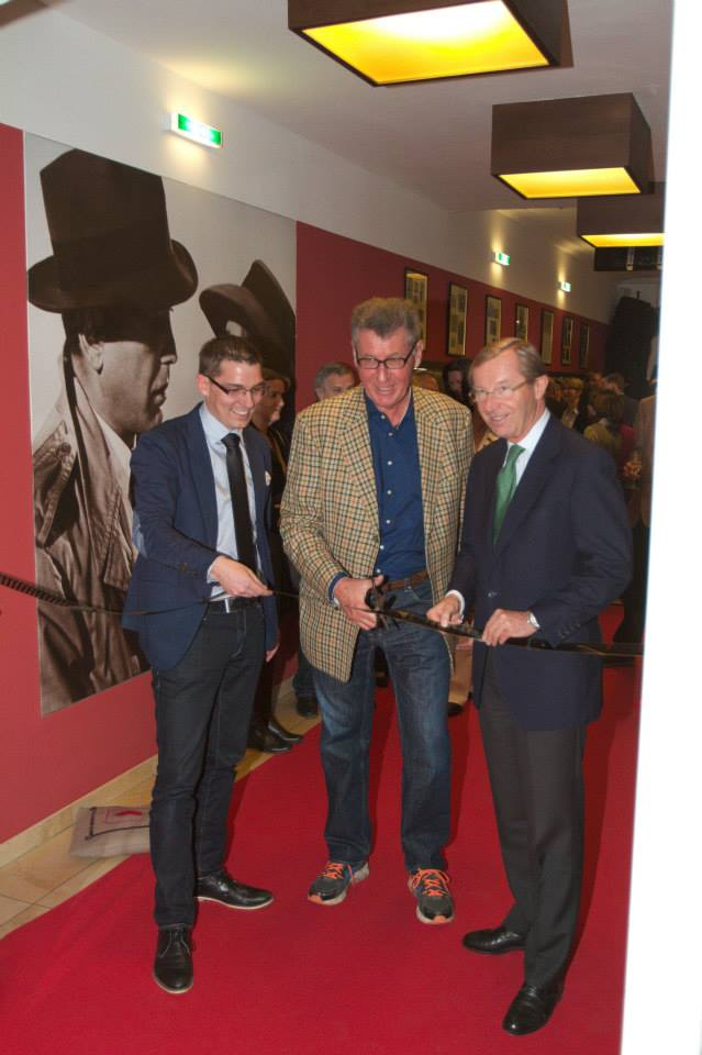 Neueröffnung des Mozartkino Salzburg am 07.11.2014. v.l.n.r.: Alexander Krammer (Prokurist Altstadthotel Kasererbraeu und Mozartkino), Kurt Giebich (Inhaber Altstadthotel Kasererbraeu und Mozartkino), Wilfried Haslauer (Landeshauptmann von Salzburg)